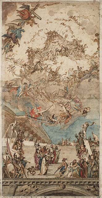 Entwurf für einen Deckenplafond mit der Apotheose der Malerei.